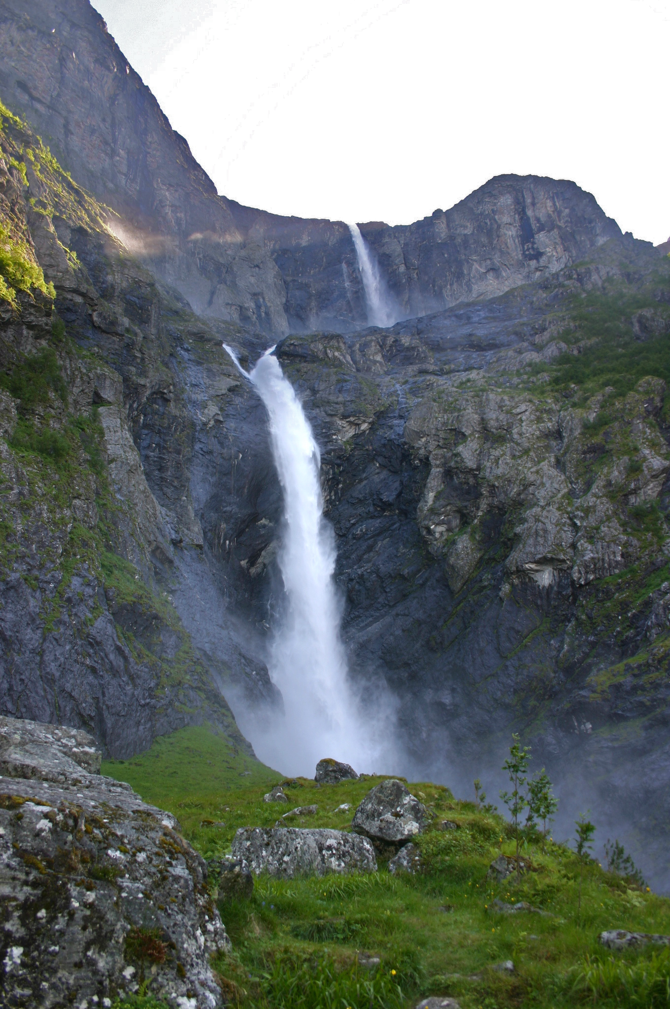 Mardalsfossen